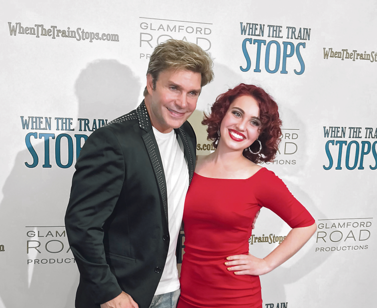 Emie Morissette accompagée de l'acteur Vic Mignogna